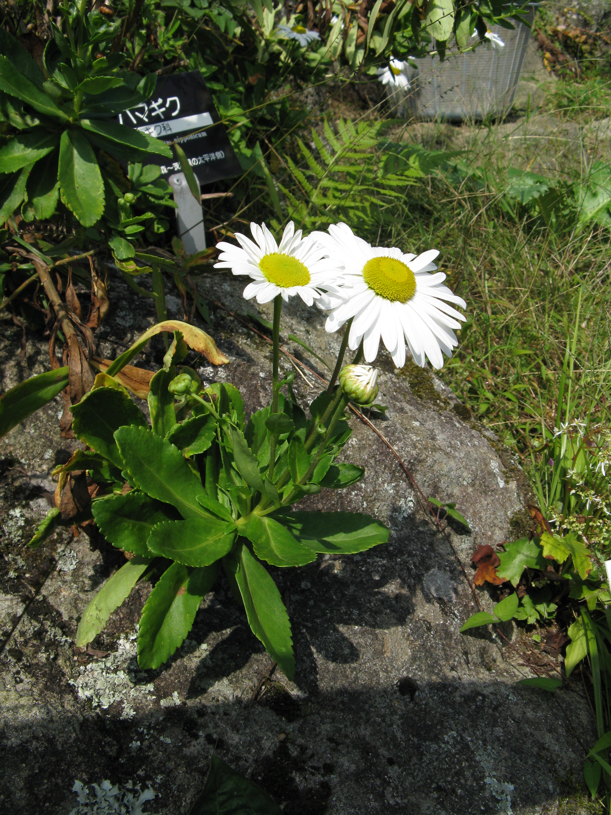 Scientific name Nipponanthemum nipponicum